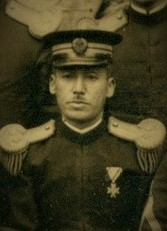 中文（台灣）: 板垣四十六郎先生：1930年（昭和5年）5月28日至1937年（昭和12年）4月2日